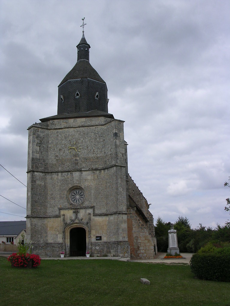 Eglise Notre-Dame des Etilleux